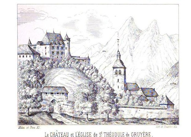 Château et église Saint Théodule de Gruyères